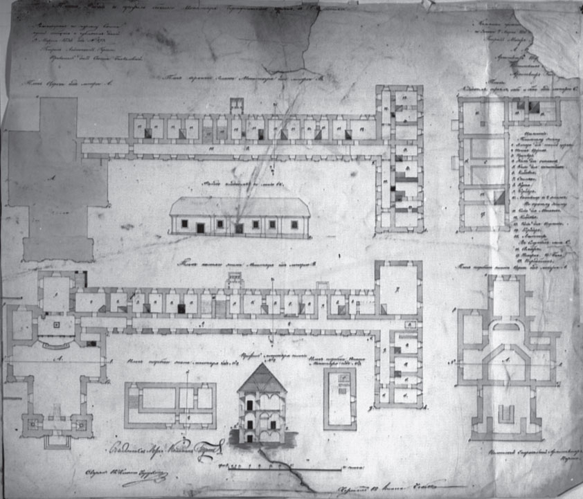 Беларуская (тарашкевіца): Полацак (Połacak), Задзьвіньне (Zadźvińnie). Касьцёл Сьвятой Ганны і кляштар бэрнардынаў, абмеры